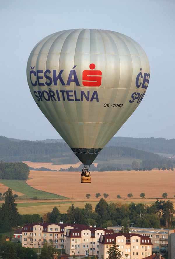 Horkovzdušný balón v letu